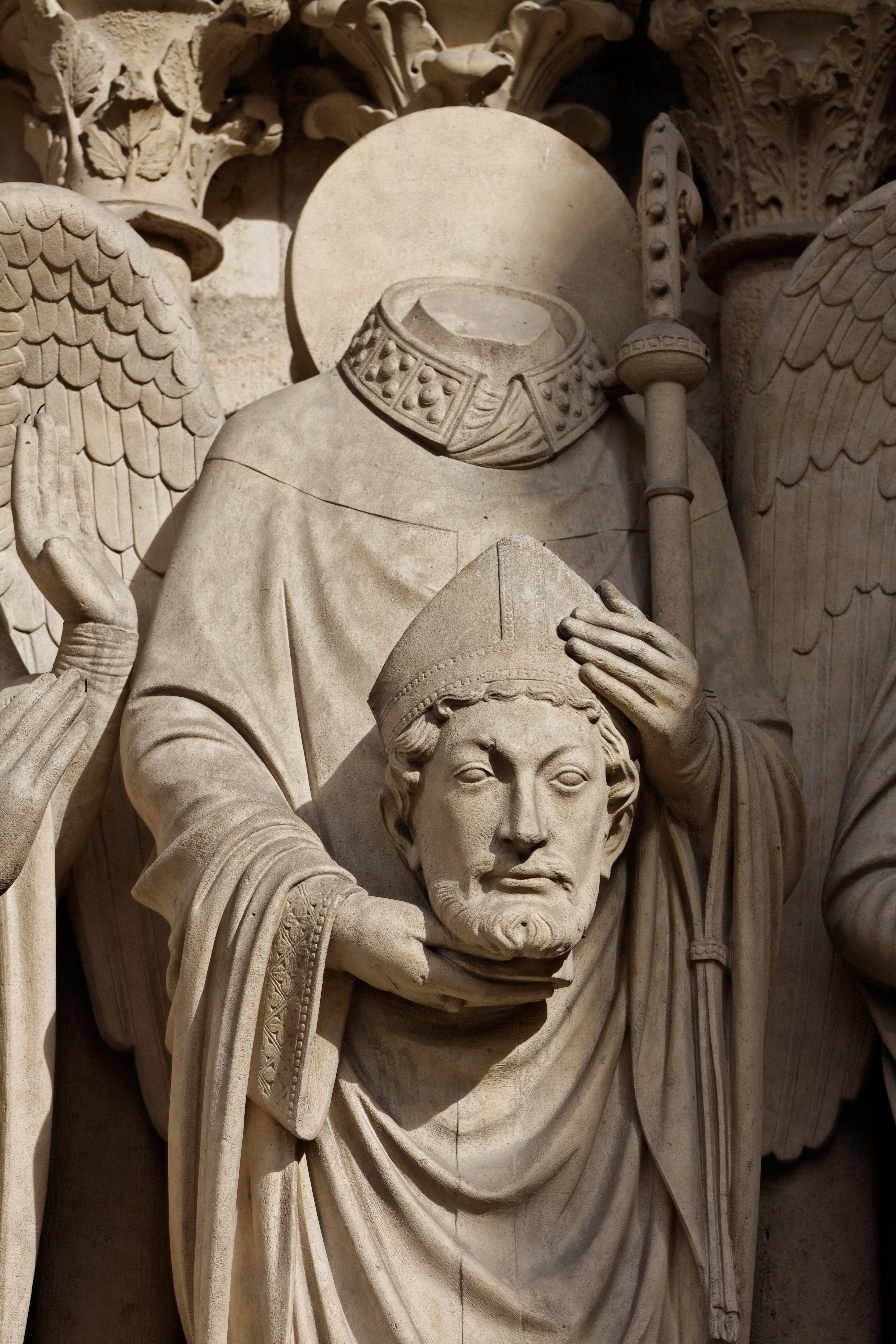 Vue d'un détail du portail de la Vierge sur la façade ouest de la cathédrale Notre-Dame de Paris.